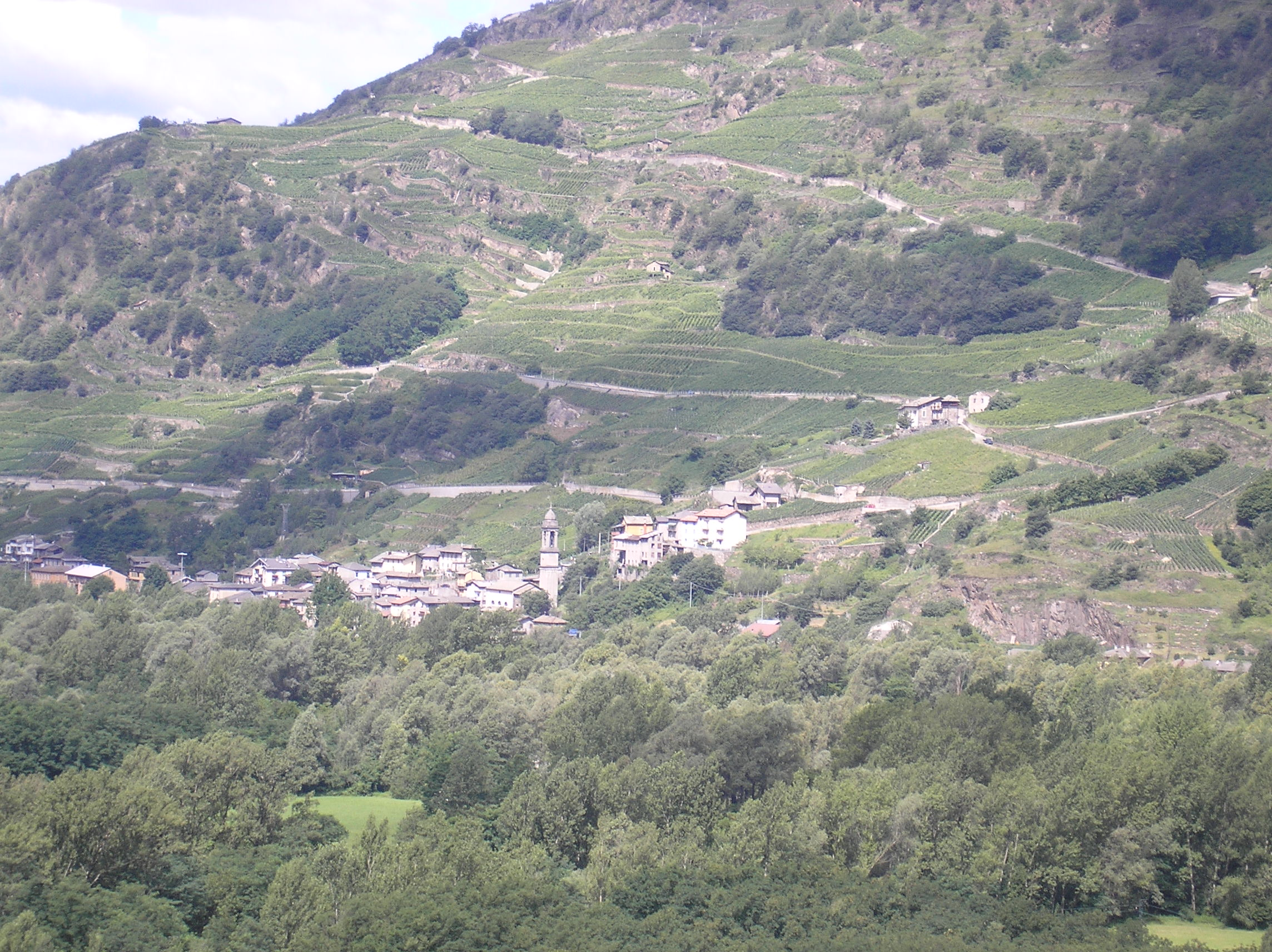 Panorama di Tresenda